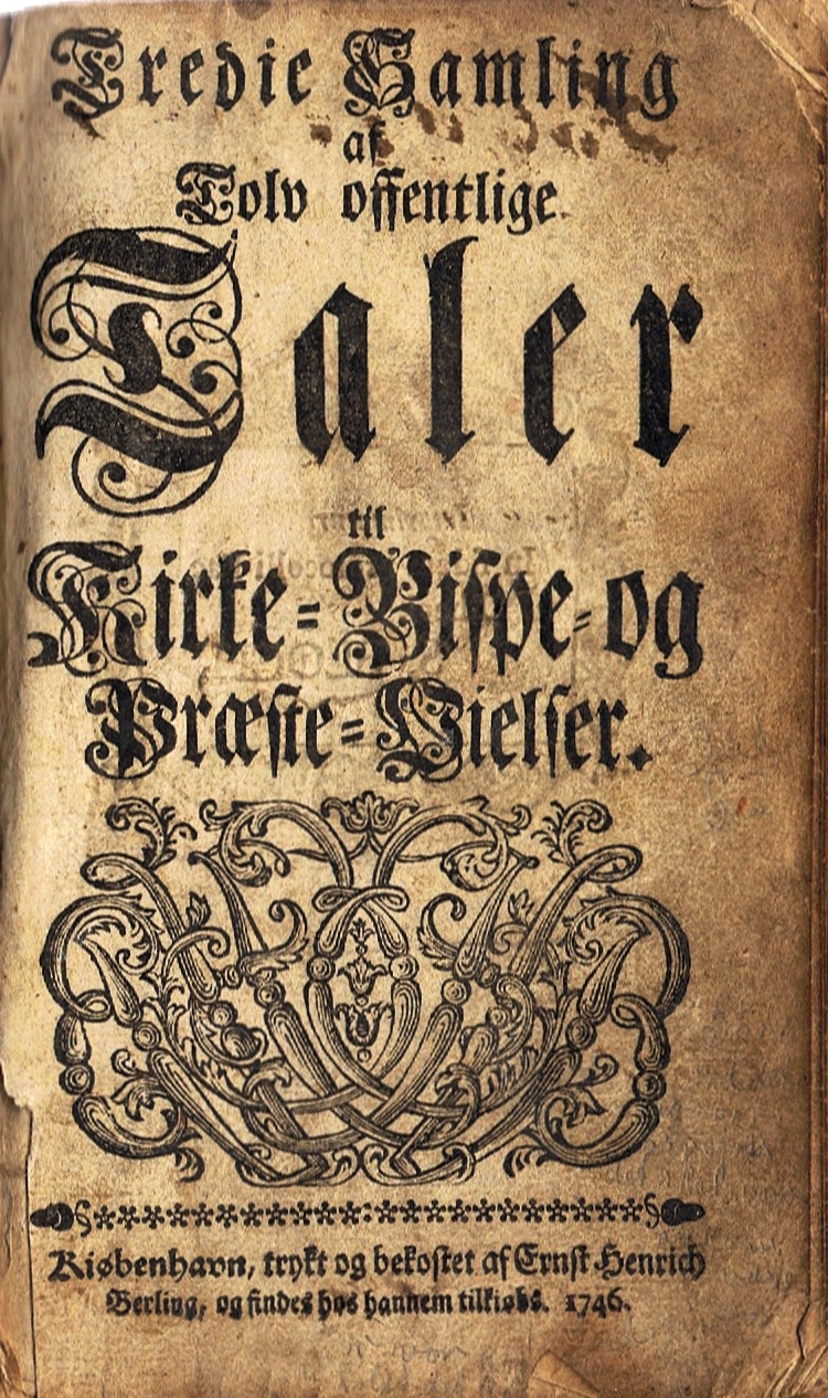 Herslebs offentlige taler